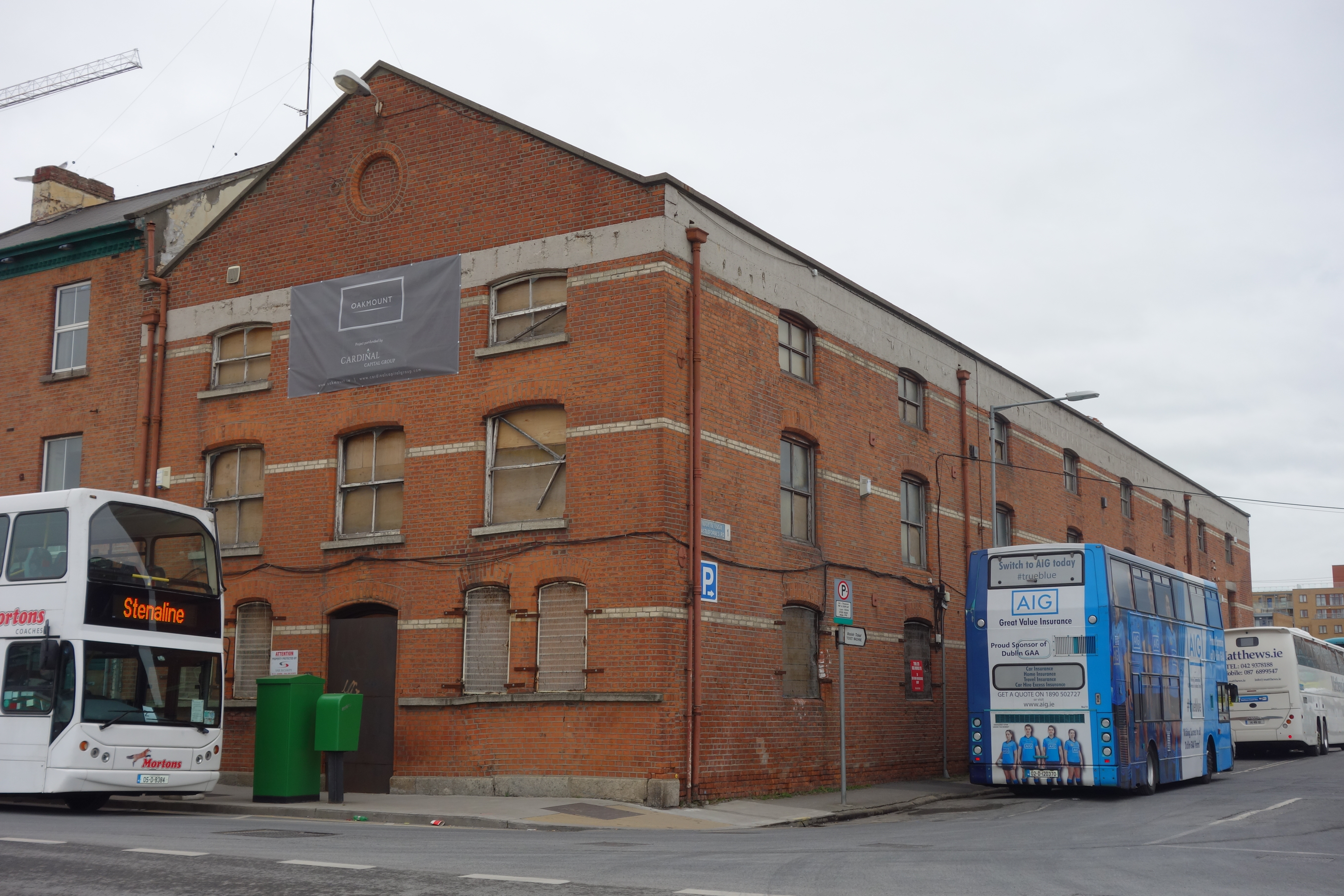 Lagerhalle, 82 North Wall Quay, Castleforbes Road